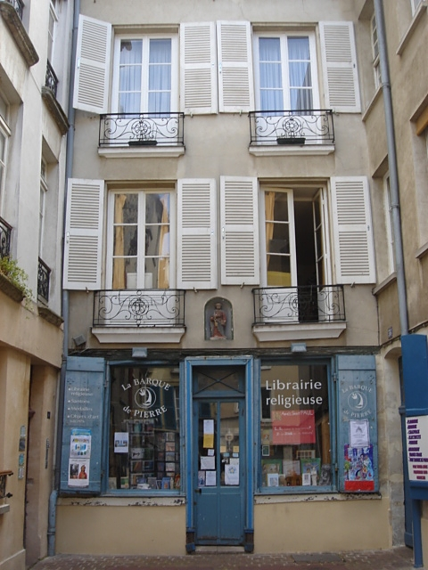 Boutique d'objets religieux, France, XVIIe siècle. Saint-Germain.